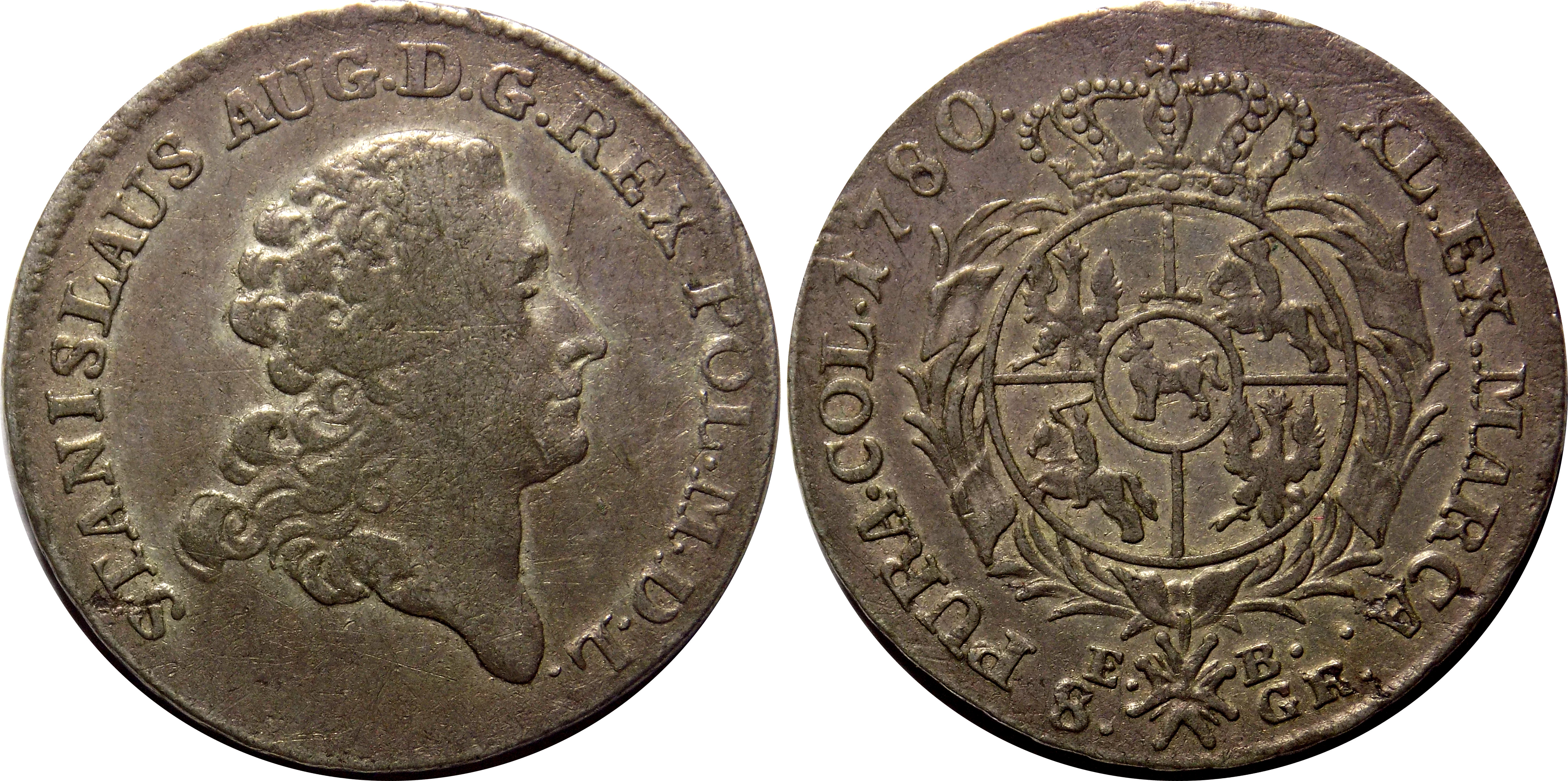 Dwuzłotówka koronna 1780